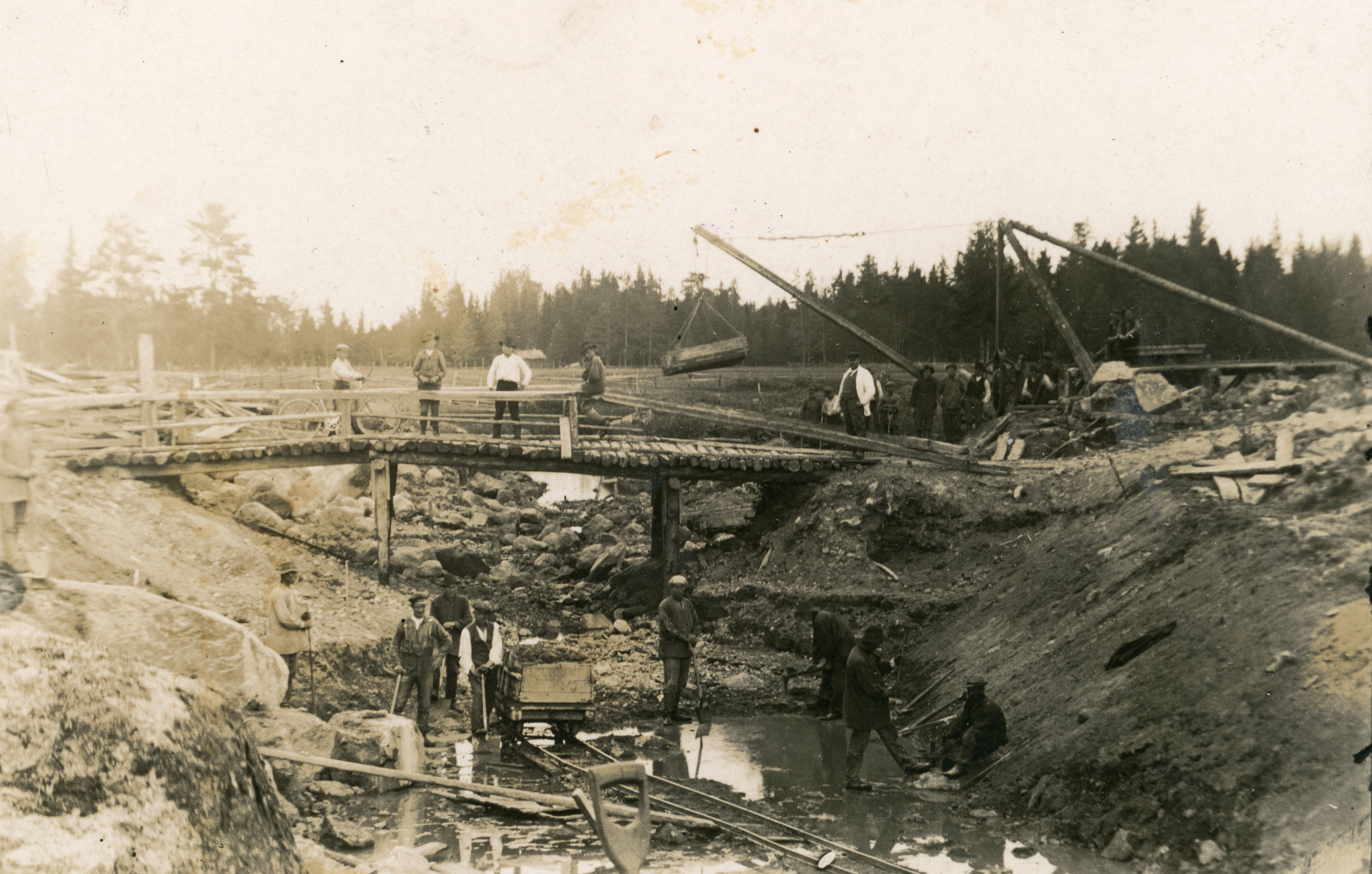 Sillanrakennusta Karjalassa, kyseessä luultavasti Ruutin silta